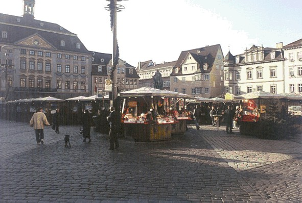 Coburger Weihnachtsmarkt Fotograf: presse03, selbst erstellt, Dez. 2003 Lizenz: GNU-FDL